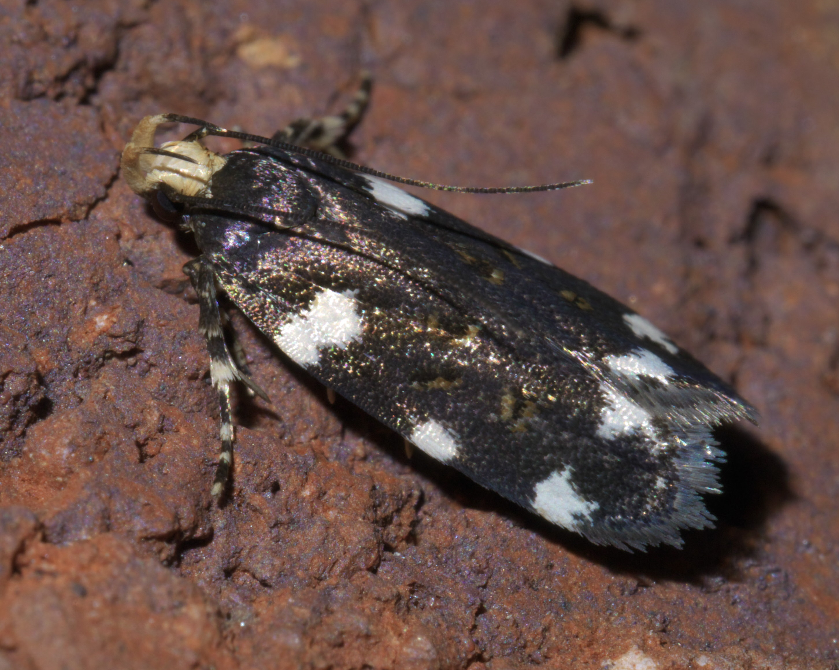 Fascista cercerisella, redbud leaffolder, Size: 8 mm, ID Confidence: 90